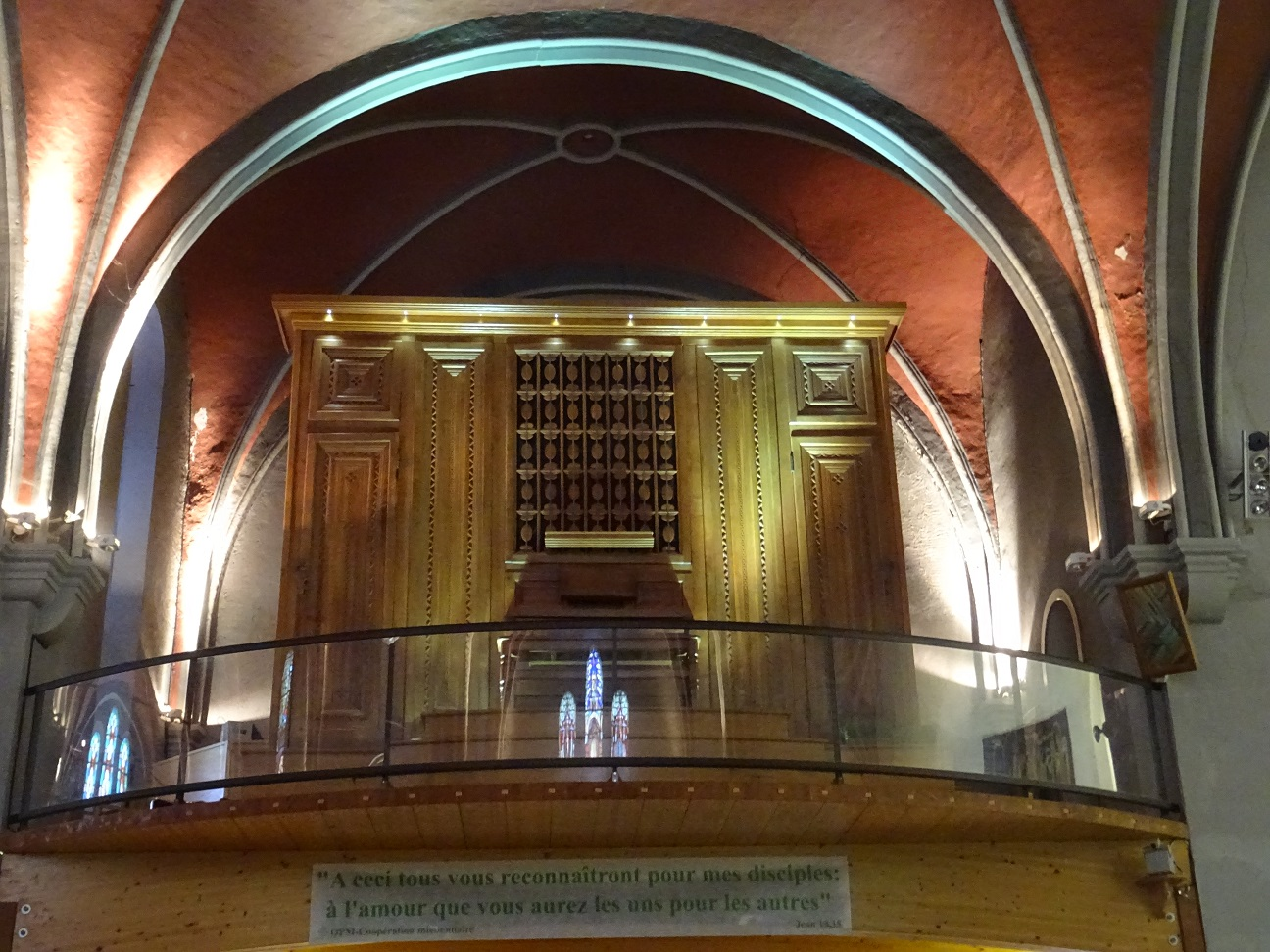 Orgue philarmonique à jeu automatique de marque Aeolian (U.S.A.) avec ses 700 rouleaux perforés, de l'église des Gets (Haute Savoie, France).